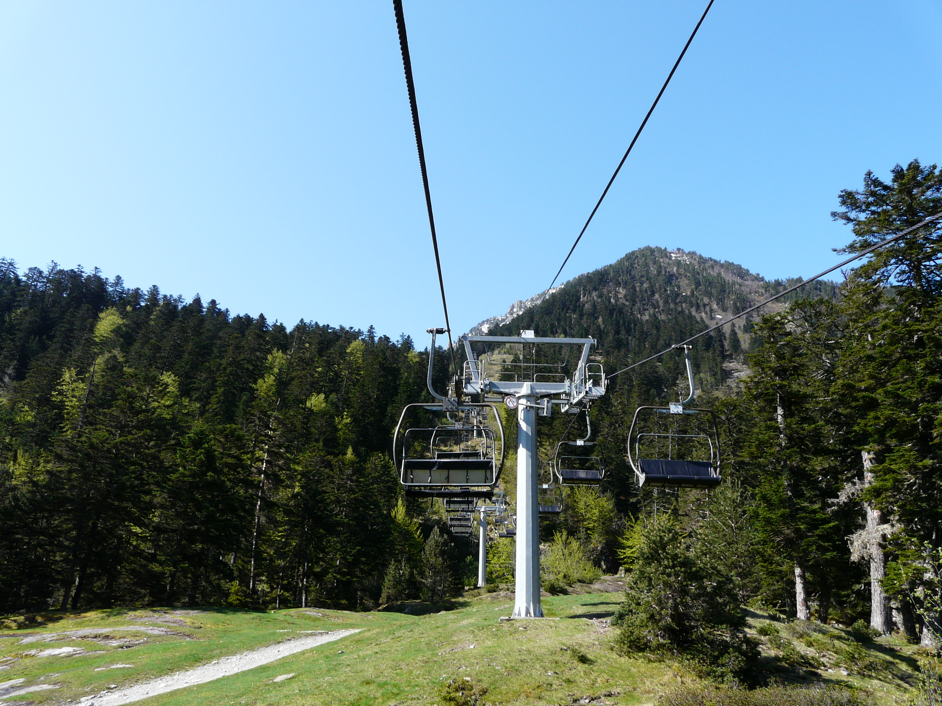 Le télésiège de Gaube, Cauterets, Hautes-Pyrénées, France.